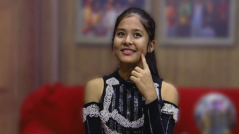 नेपाली: तेरिया फौजा मगर एक कार्यक्रममा